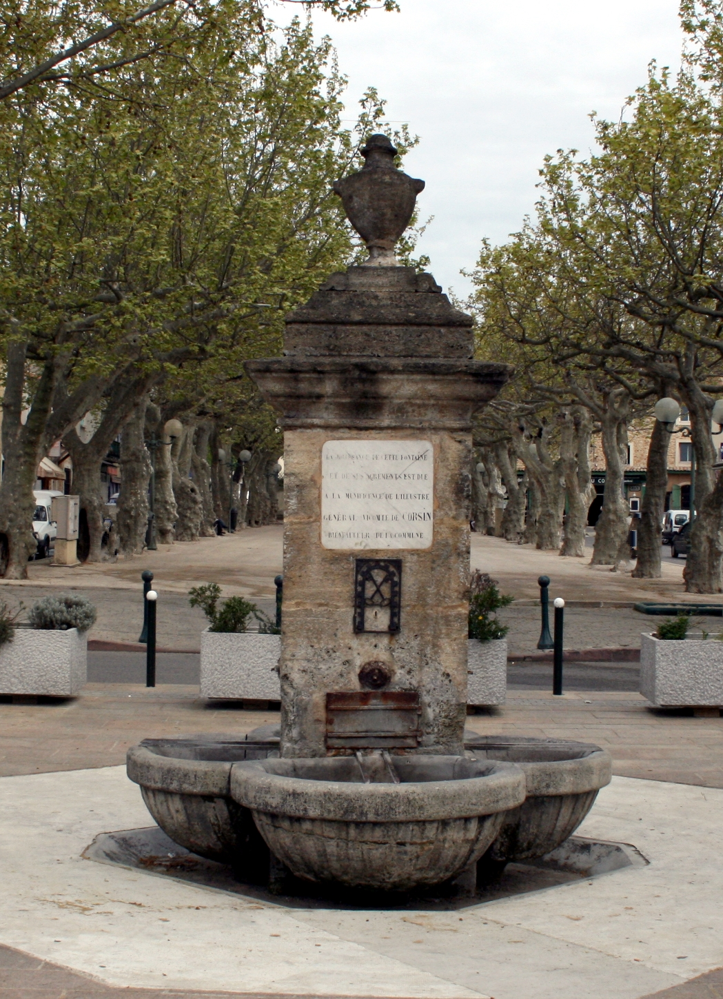 Fontaine du Cours à Piolenc (Vaucluse)